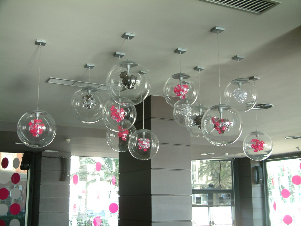 Decoración con lámparas de led de diseño italiano acorde con el resto del local, Palm Beach en Alicante